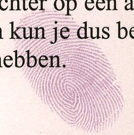 eigen werk